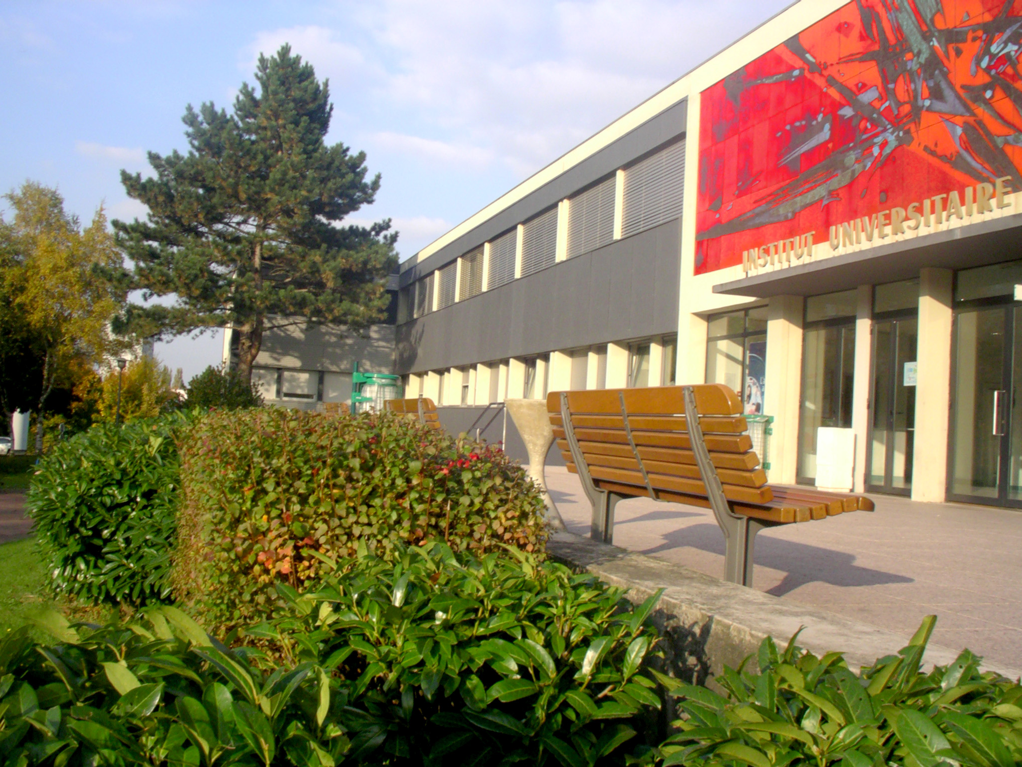 Entrée de l'IUT de Mulhouse vue rasante, 61 rue Albert Camus, Mulhouse